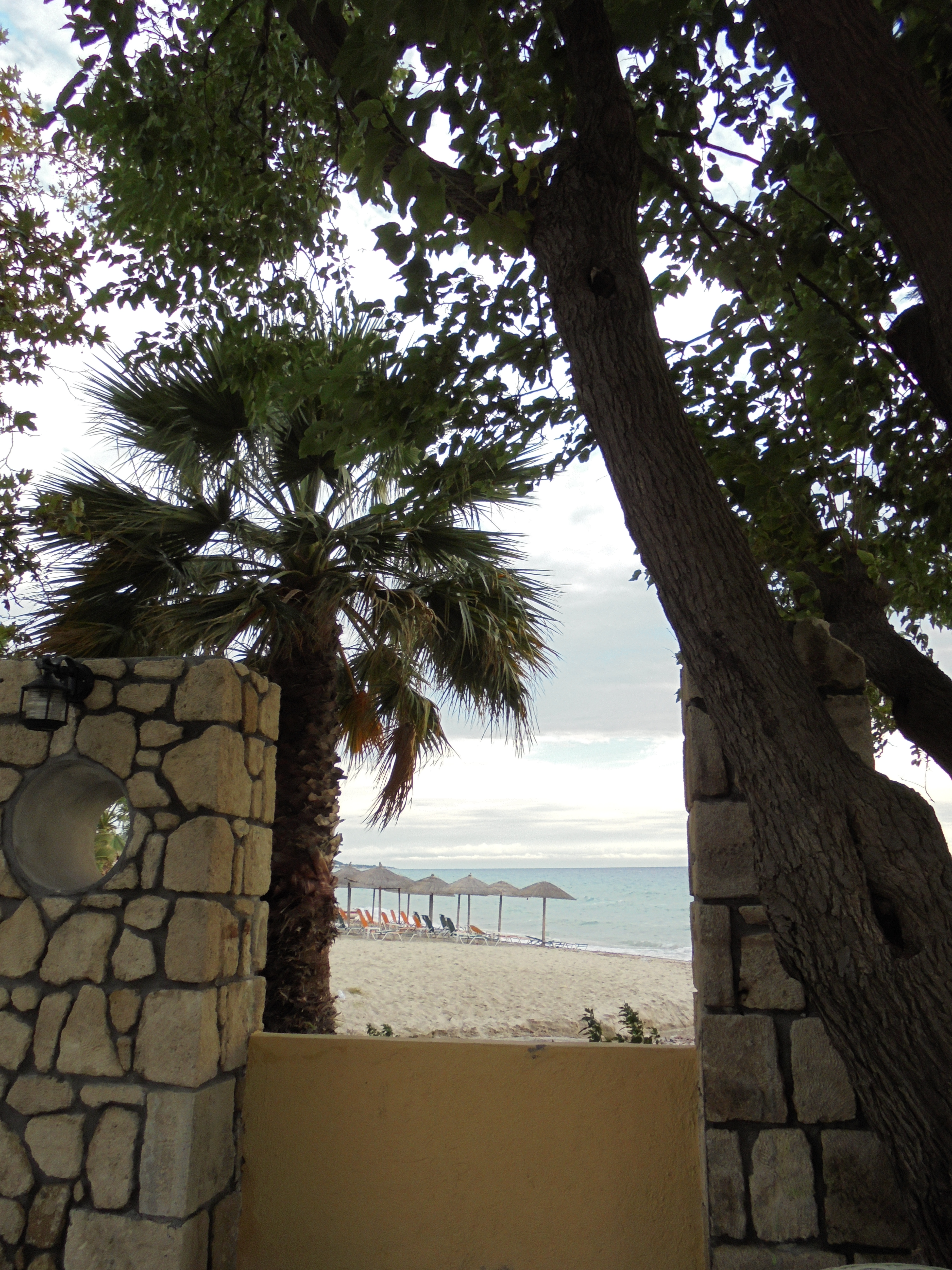 The beach